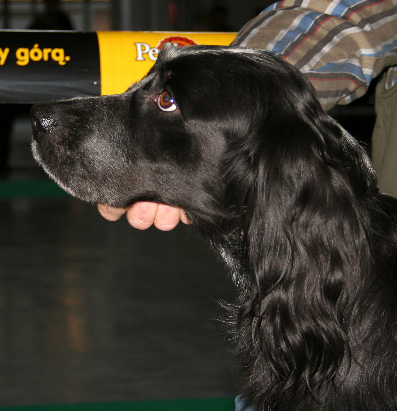 Epagneul_bleu_de_picardie na Światowej Wystawie Psów Rasowych w Poznaniu